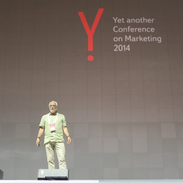 Андрей Себрант на коференции YaСm